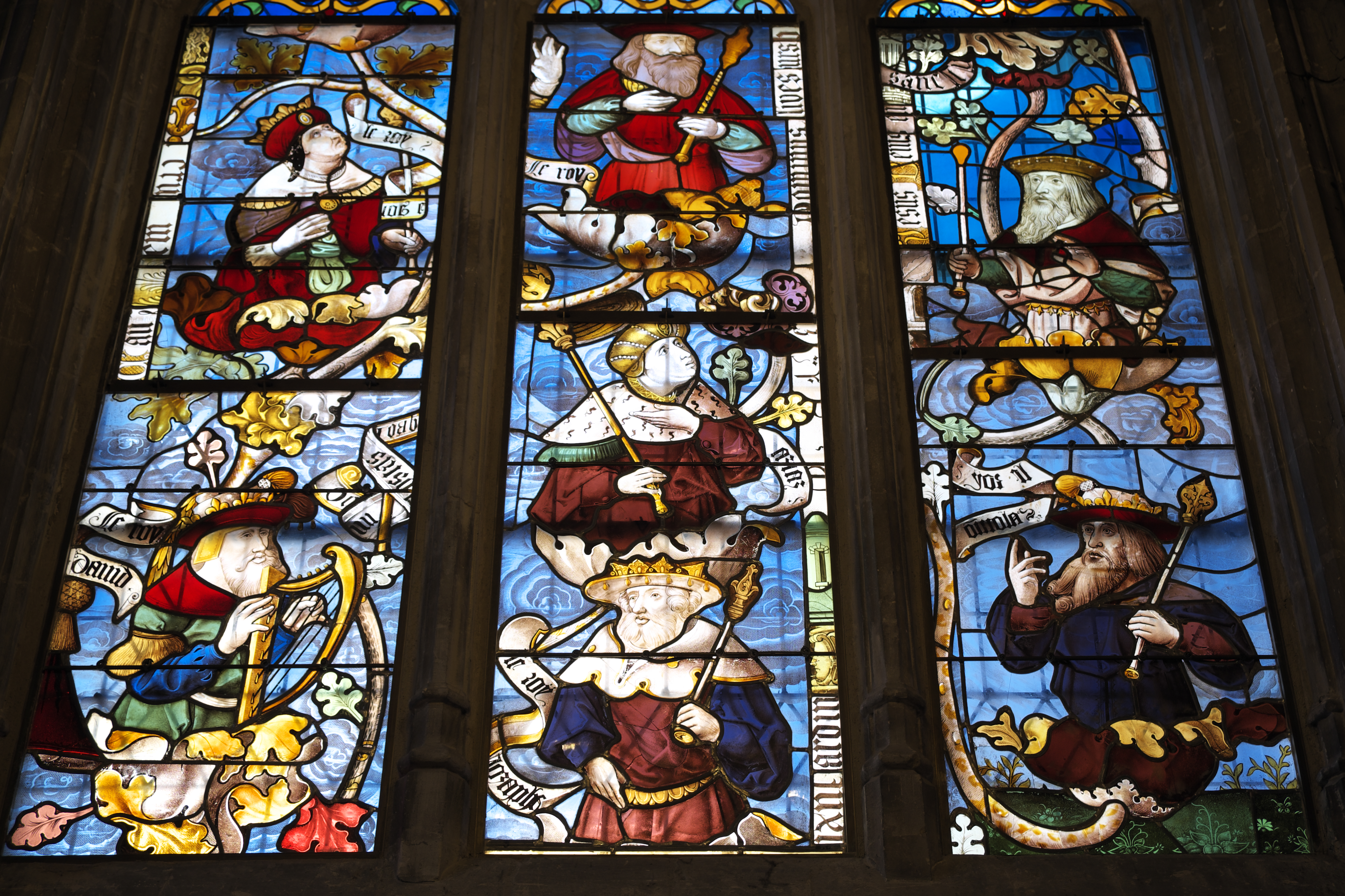 Palais Rihour in Lille im Département Nord (Nord-Pas-de-Calais/Frankreich), Bleiglasfenster mit Fragmenten aus dem 16. Jahrhundert, Darstellung: Wurzel Jesse